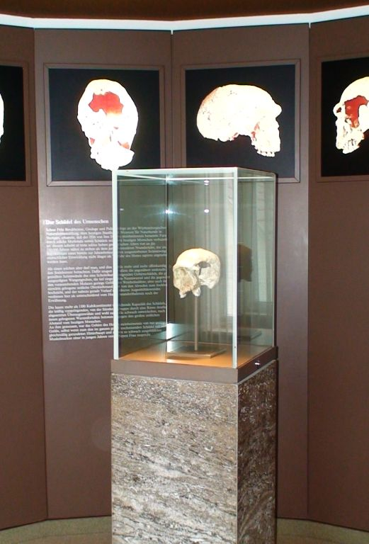 Urmensch-Museum Steinheim an der Murr, Badenwürttemberg - Vitrine mit der Schädelnachbildung des "Steinheimer" Urmenschen